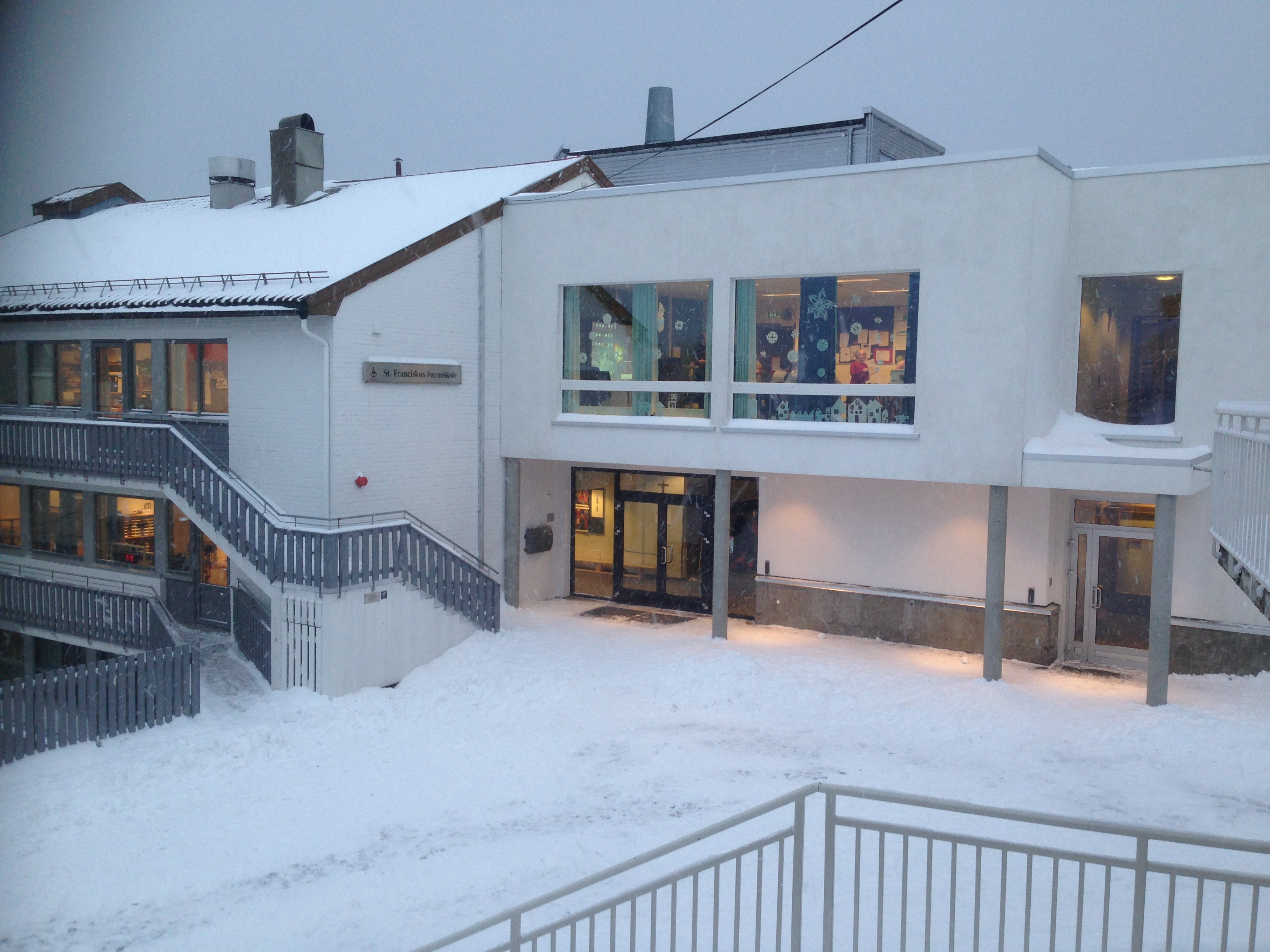 St. Franciskus skole. Dette er barneskolen som består av det tidligere søsterhjemmet (St. Franciskus Xaveriussøstrene) og nybygg tegnet av arkitekt Kjell Jensen. Nybygget er fra 2013.